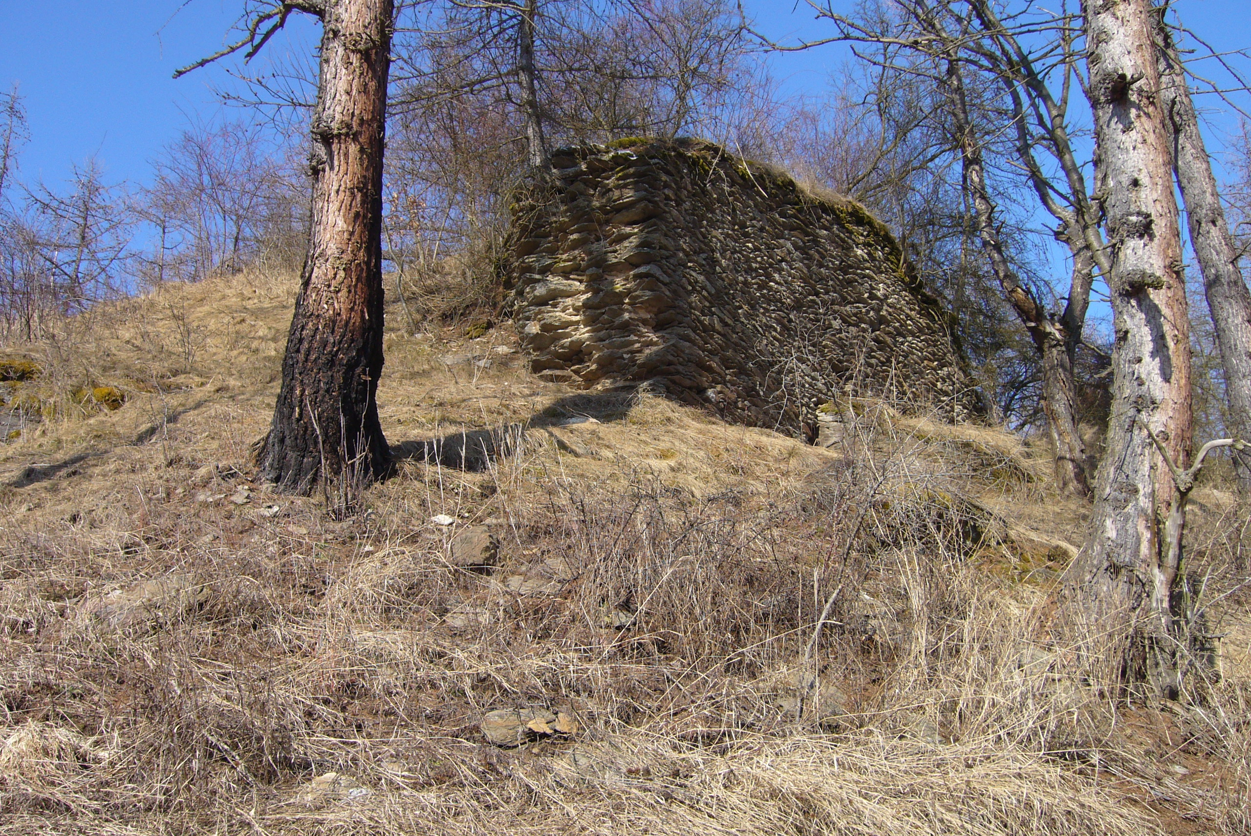 Hrad Štědrý Hrádek, zřícenina a archeologické stopy (Borek), SZ od Borku, Borek